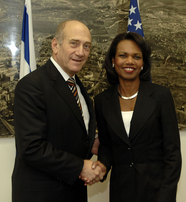 Ehud Olmert and Condoleezza Rice.